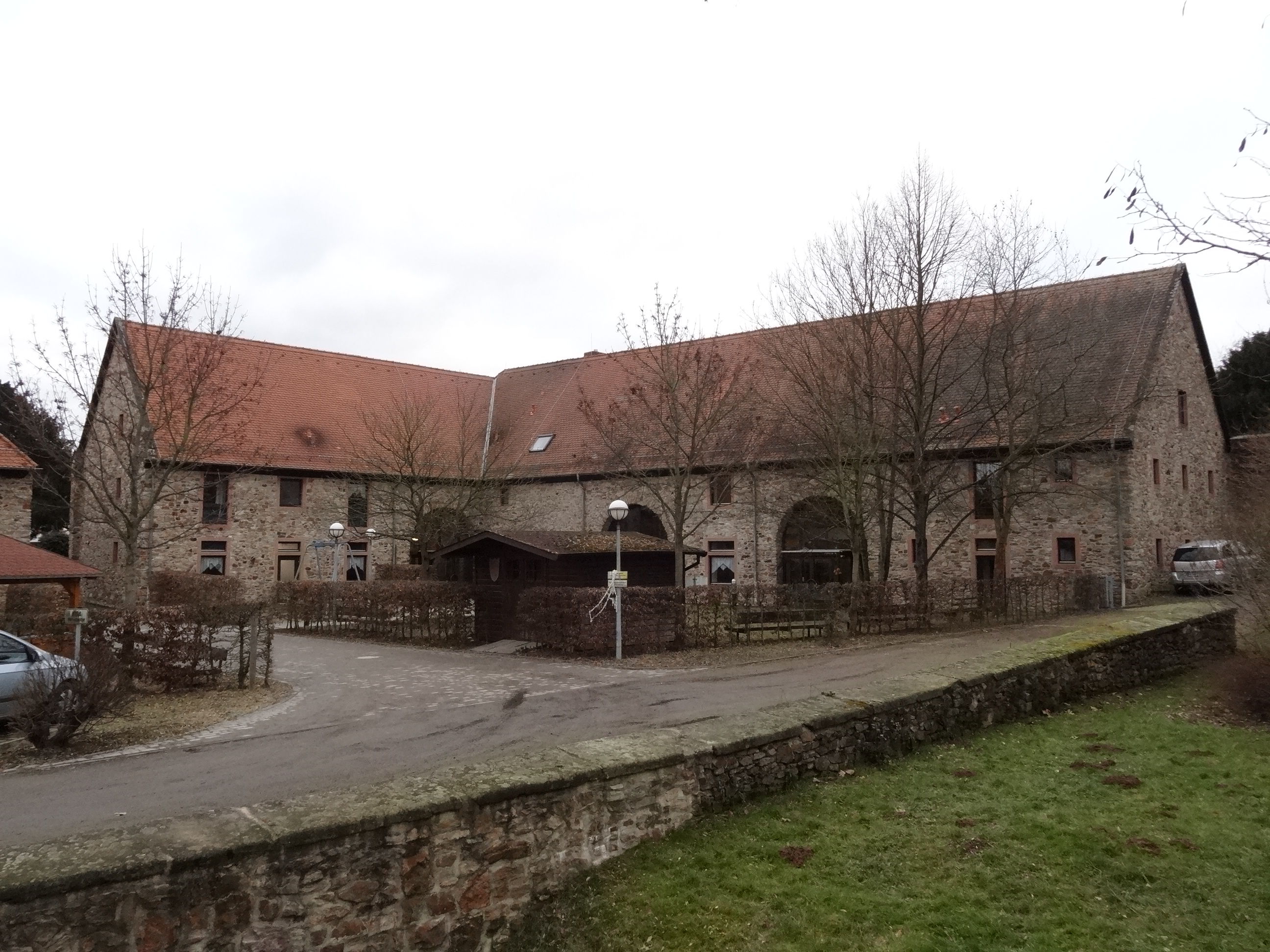 Ehemalige Wasserburg Ockstadt